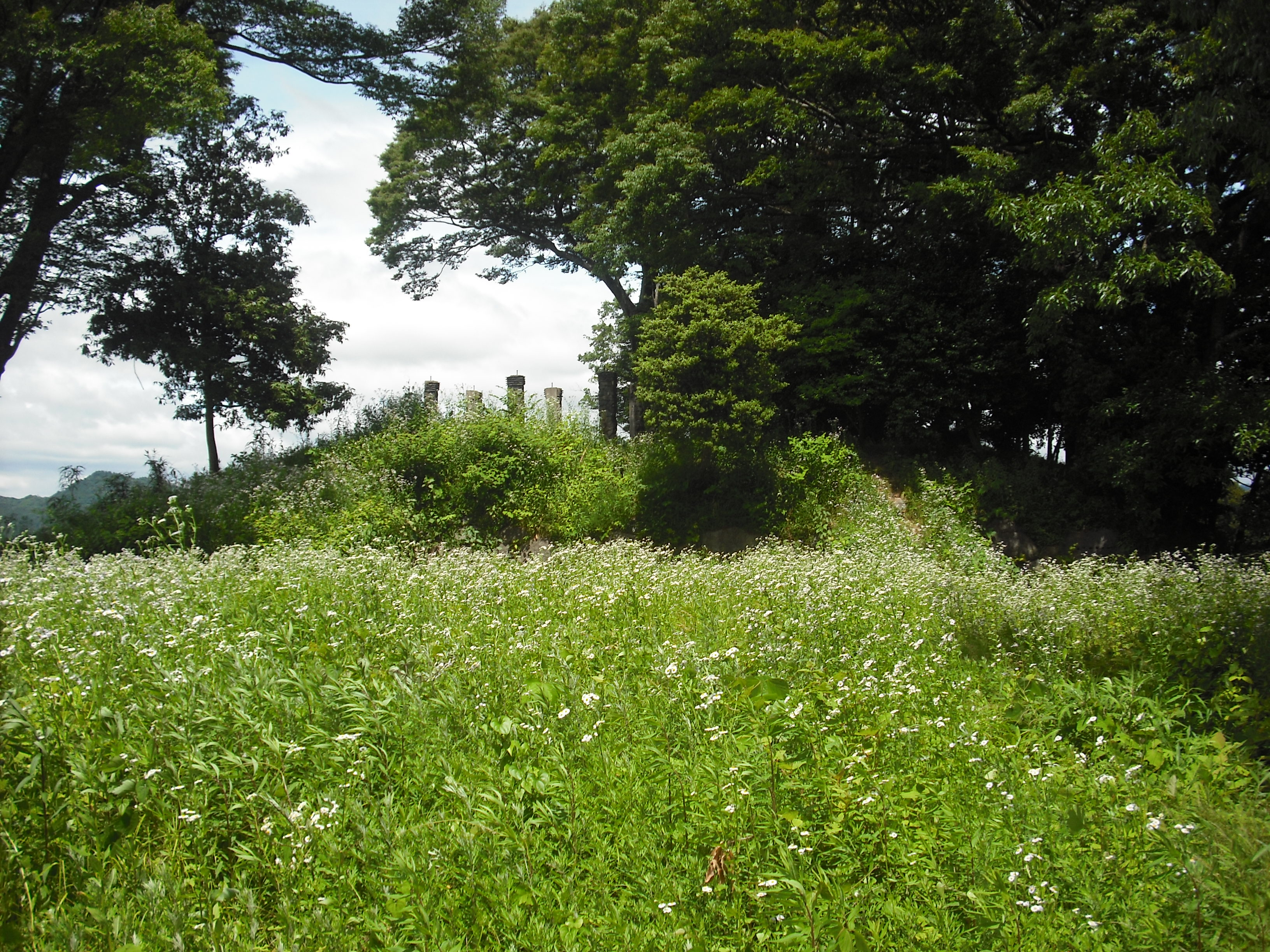 宇陀松山城 天守台